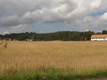 Her på jordene til Søndre Linnestad gård i Re kommune i Vestfold kan Slaget på Re ha blitt utkjempet.